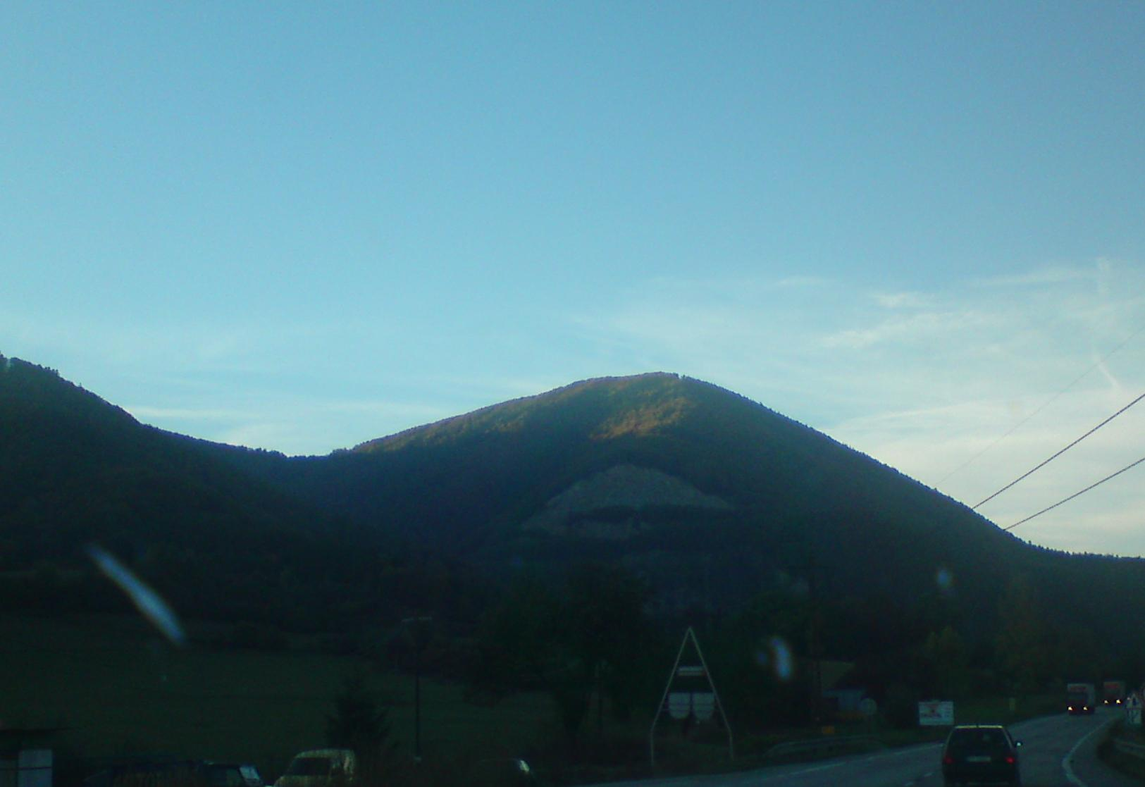 Pohlad od Vrutok